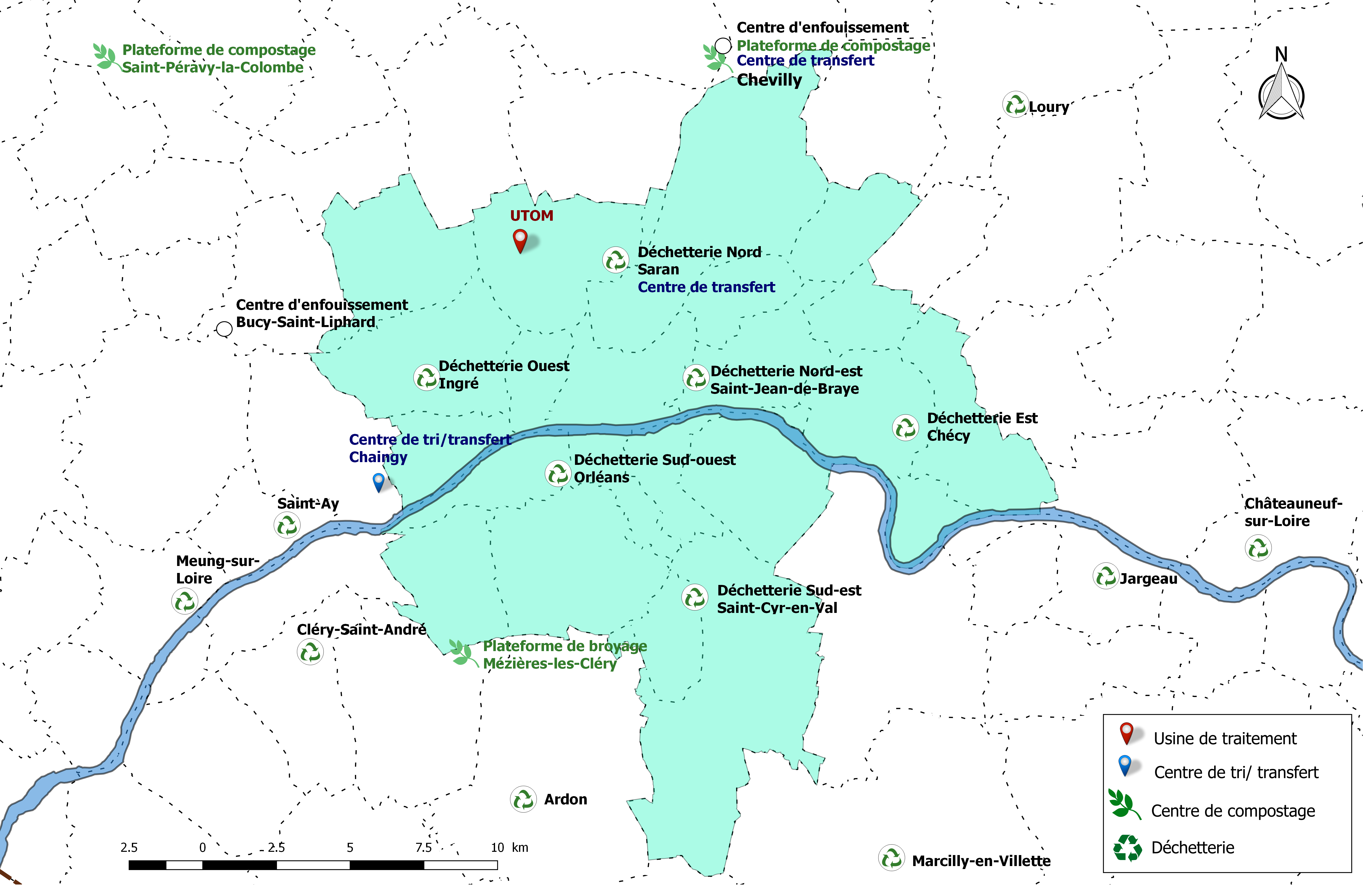 Site de traitement et de valorisation des déchets d'Orléans Métropole.